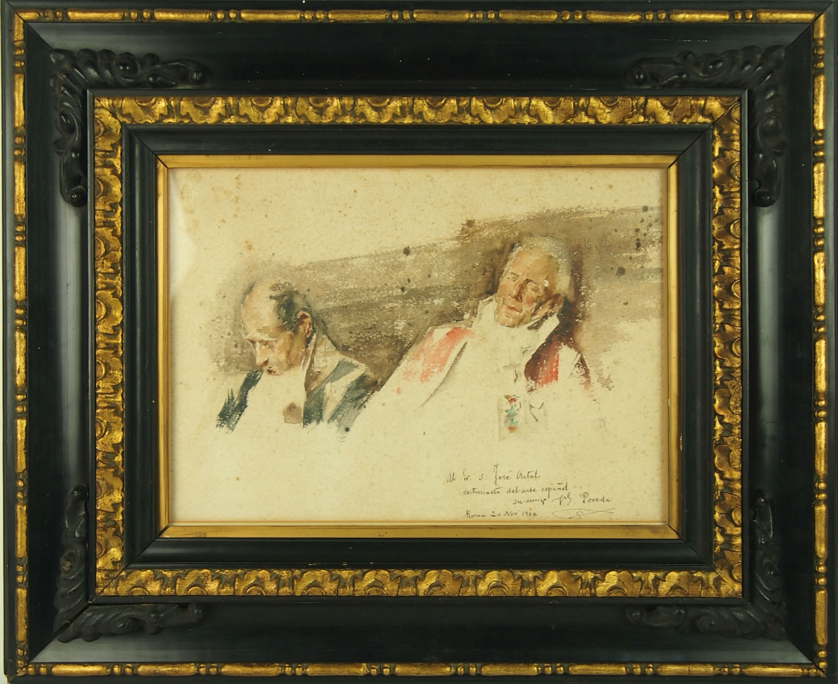 Acuarela sobre papel.